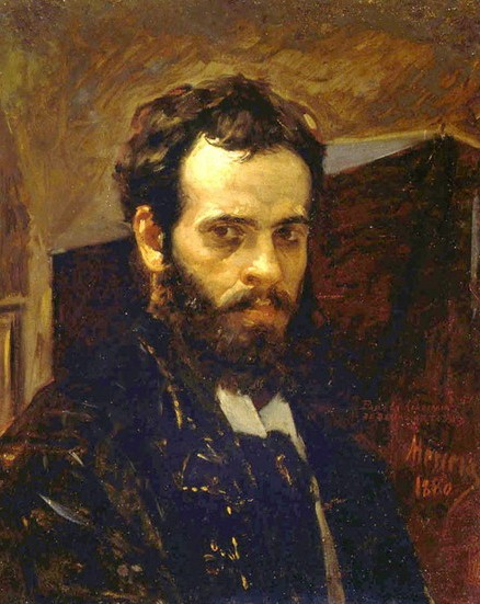 Autoretrato Antonio Herrera Toro 1880. autor Antonio Herrera Toro (1857 - 1914) Pintor Venezolano